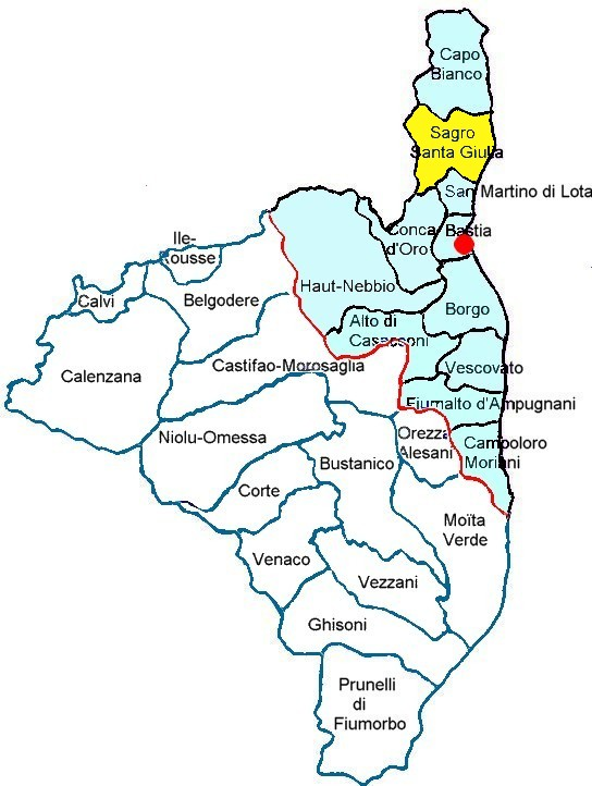 Localisation du canton de Sacro-Santa-Giulia, Capicorsu, Haute-Corse